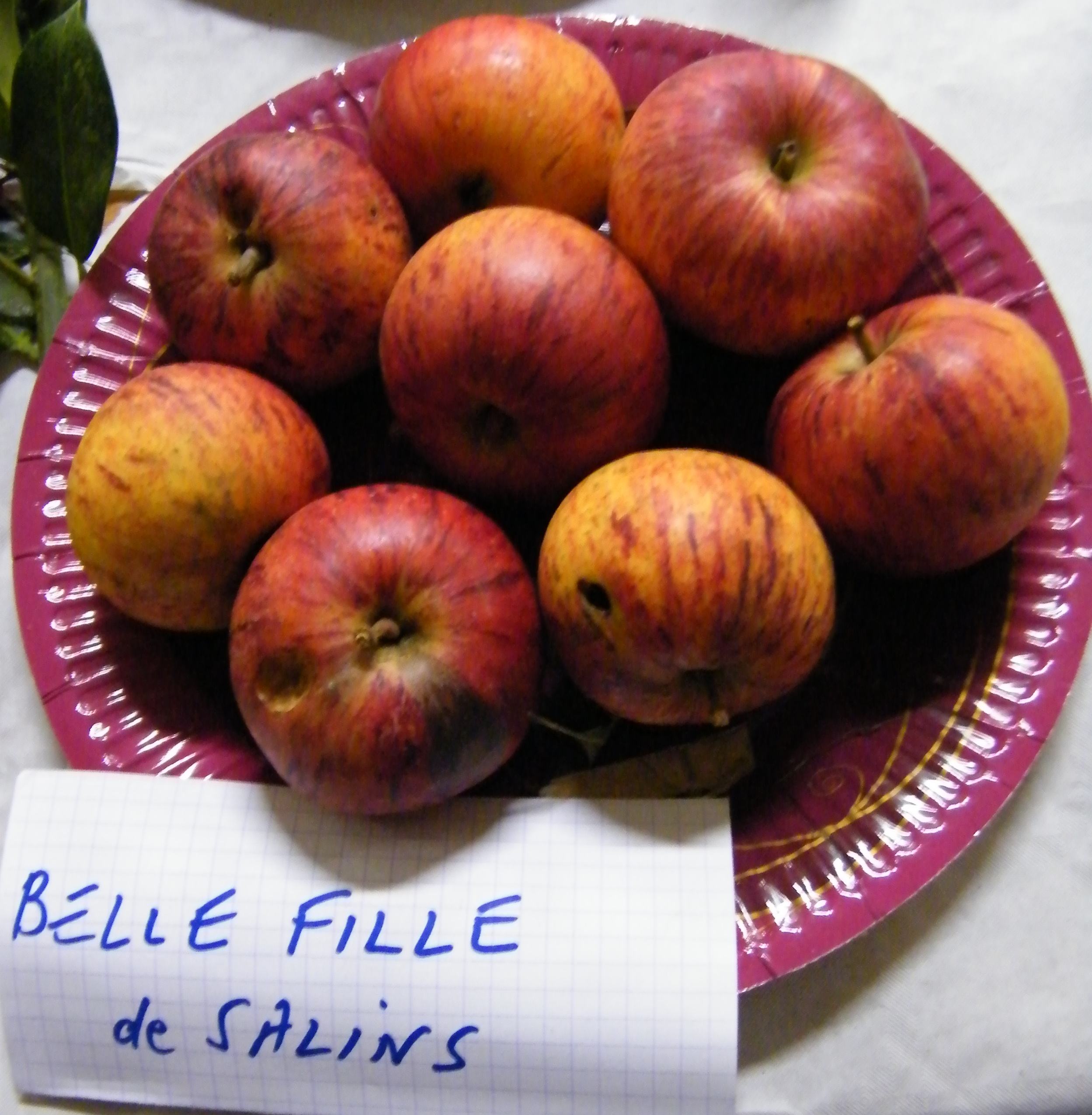 Belle Fille de Salins, Mons-Boubert, Somme, Fr